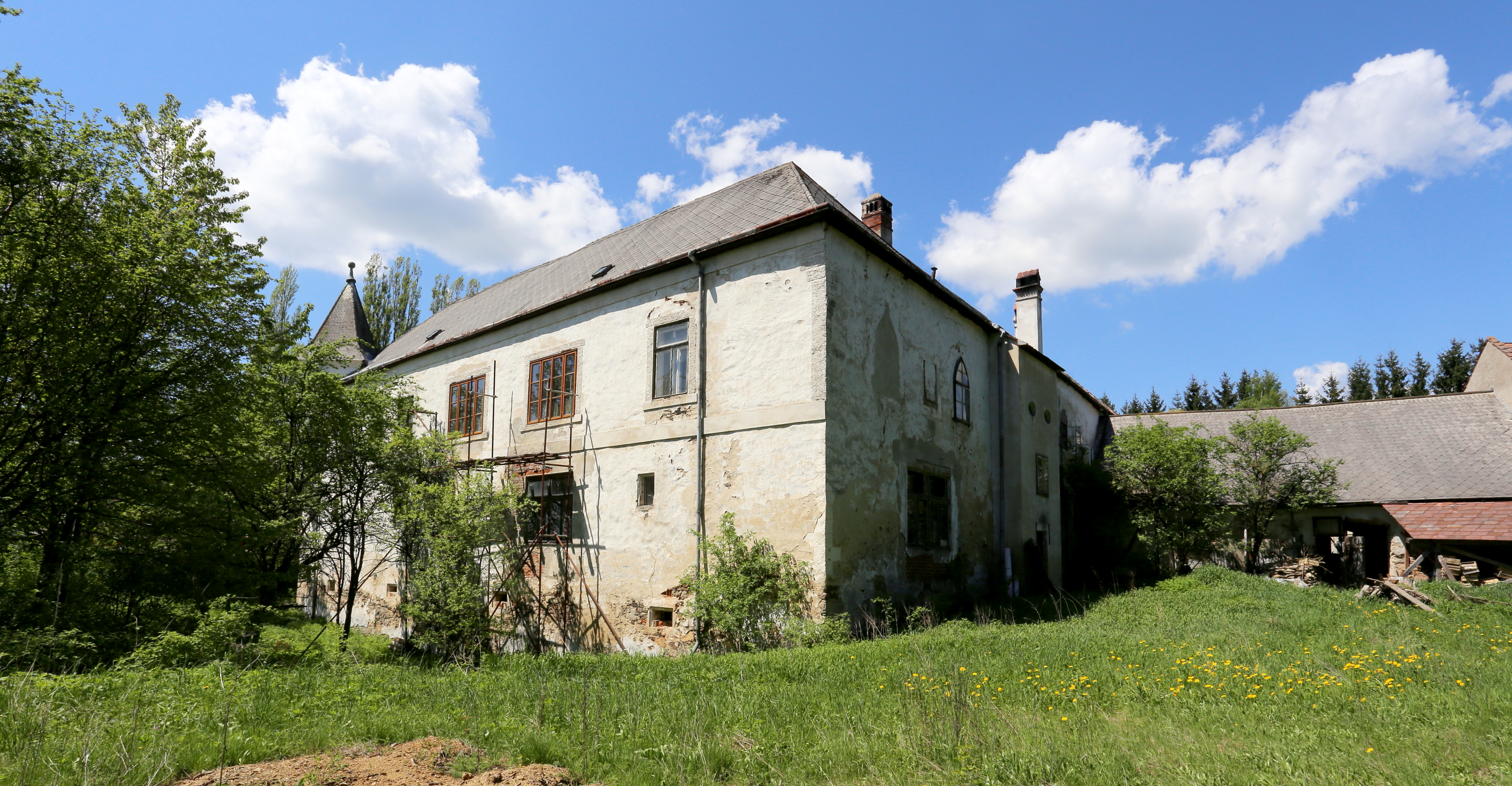 Nordansicht des Schlosses in Arndorf, ein Ortsteil der niederösterreichischen Marktgemeinde Pöggstall. Links das zweigeschossige Hauptgebäude und rechts das anschließende Wirtschaftsgebäude, das großteils im 19. bzw. 20. Jahrhundert errichtet wurde.